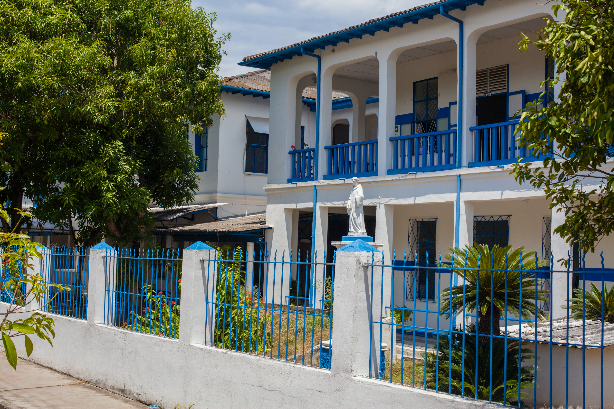 Sanatorio Agua de Dios. Hospital Herrera Restrepo